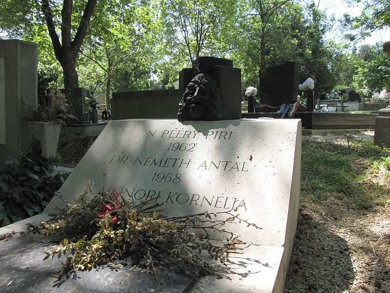 Peéry Piri (Mersich Piroska) (Budapest, 1904. május 12.–Pécs, 1962. december 31.) színésznő és Németh Antal dr. (Budapest, 1903. május 19.–Budapest, 1968. október 28.) rendező, színházigazgató, színháztörténeti író sírja Budapesten. Farkasréti temető: 1-2-352